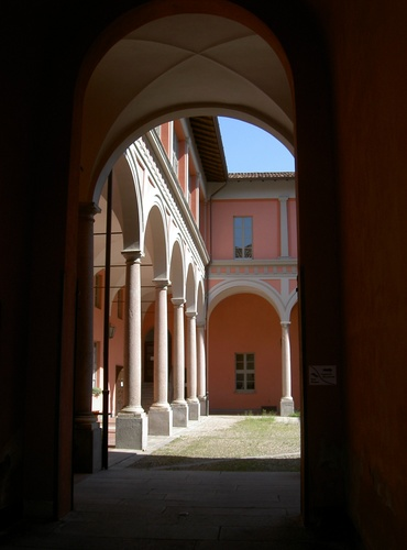 Davide Cerri, da Panoramio, foto dell'ingresso esterno del Liceo Verri con scorcio del chiostro